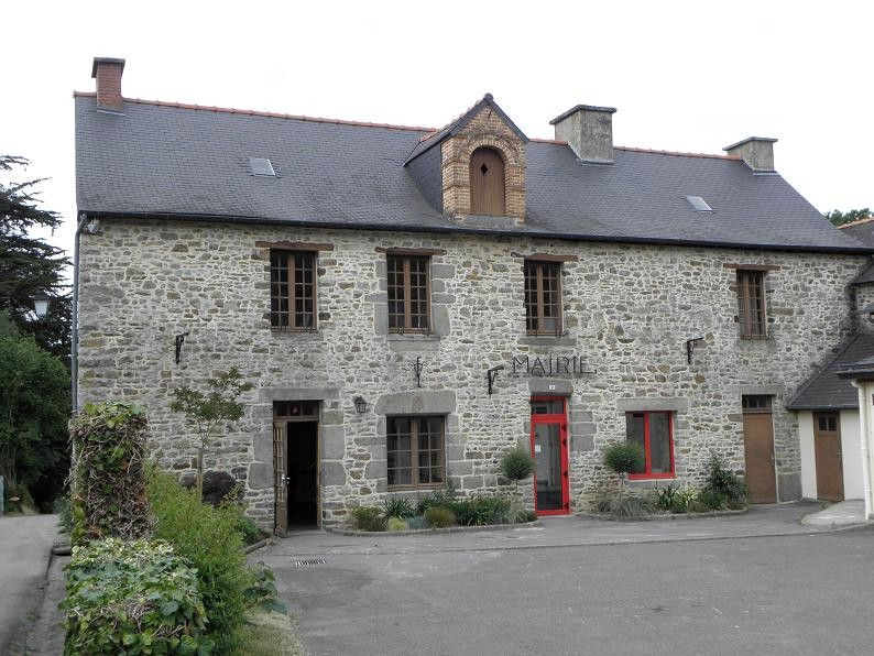 Mairie de Saint-Médard-sur-Ille (35).